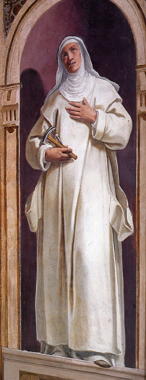 Beatrix d'Ornacieux, affresco di Daniele Crespi presso la Certosa di Garegnano a Milano (1629).